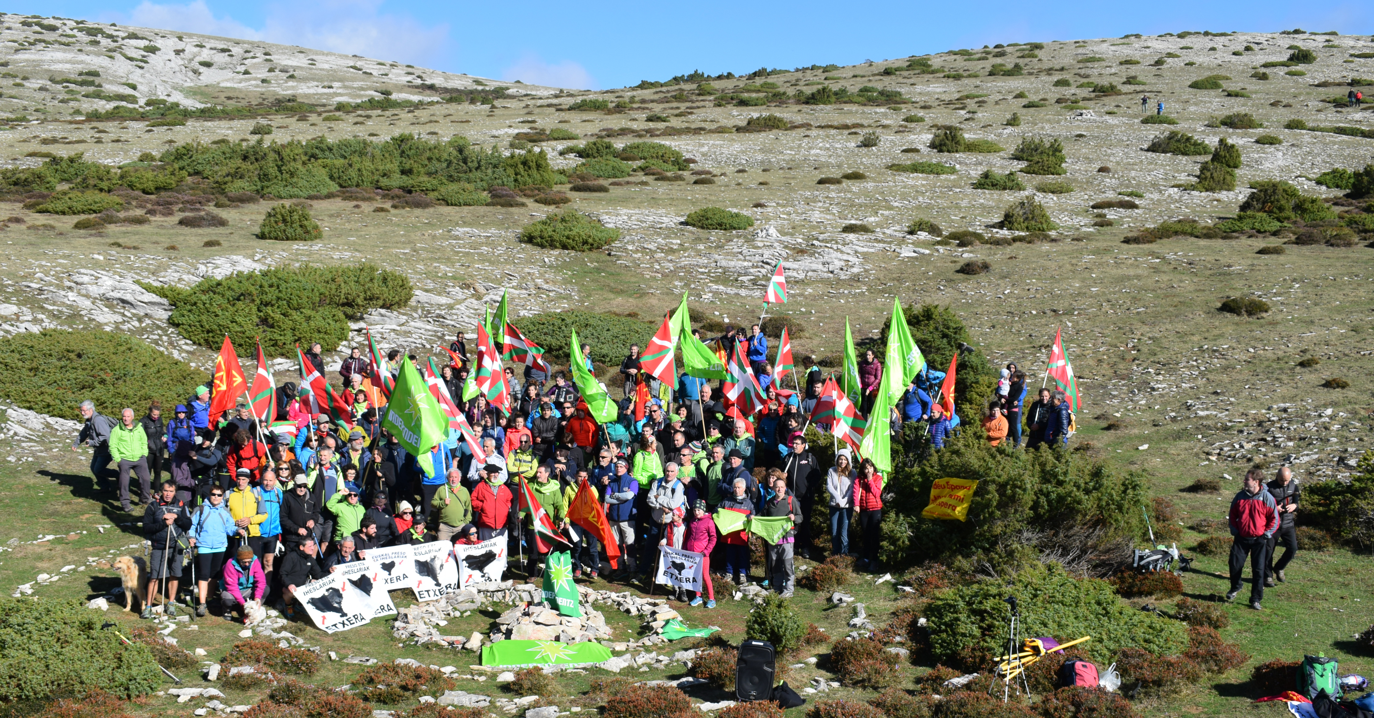 2016-10-09 - Euskal mendizaleen egitura bateratuaren aldarrikapena Euskal Herriko erdigunean